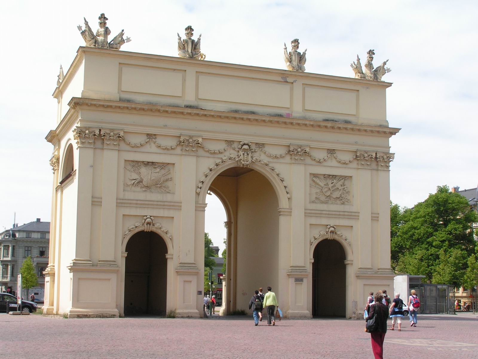 Braniborská brána v Postupimi